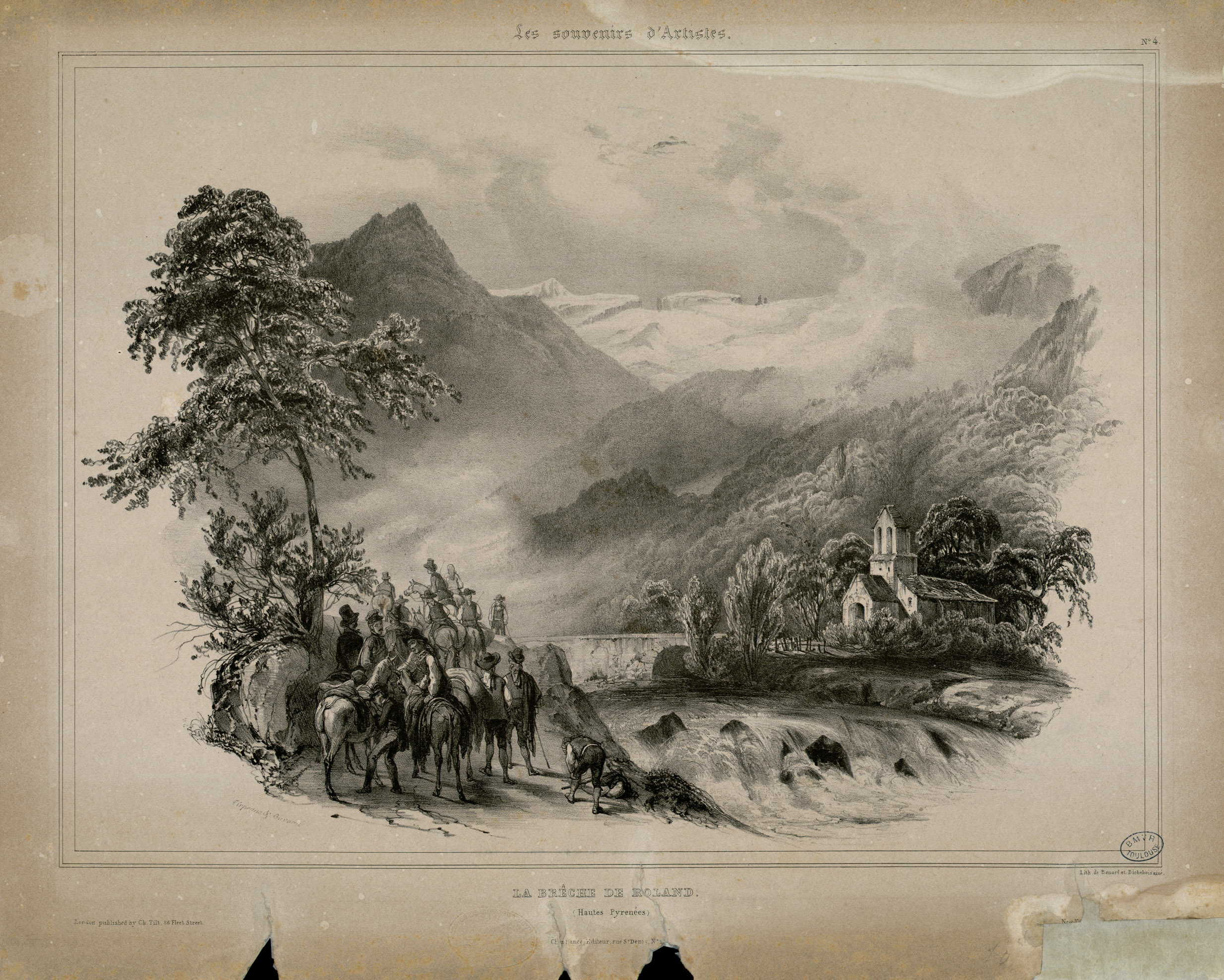 Fait partie d'un recueil de 14 pl. en n. et b. et 2 pl. en couleurs de formats divers. Oeuvres diverses sur les Pyrénées extraites de "Souvenirs des Pyrénées" (suite de 6 lithographies), de "Souvenirs d'artistes" (2 pièces sur les Pyrénées), de "Album de l'Infini" (1 pièce), de "Musiciens comiques ou pittoresques " (revue et gazette musicale) (1 pièce), de "l'Artiste" (1 pièce), de "Travestissemens (sic) grotesques" (1 pièce), de "Nouveaux travestissemens" (sic) (2 pièces) + 2 pièces séparées (pl. 13 et 14). Pl. 1 à 6 lith. par Engelmann (Paris). Pl. 7 et 8 dessinées par Cirpenne et Gavarni ; publiées à Londres par Ch. Tilt et à New York par Ward Bailly et Cie ; et lithographiées par Benard et Bichebois. Pl. 9 dessinée par Gavarni ; éditée par Bourmancé (Paris), lithographiée par Roger. Pl. 10 dessinve par Gavarni ; éditée aux Bureaux 97 Paris) ; imprimée par Thierry Frères (Paris). Pl. 11 dessinée par Gavarni ; lith. par Frey. Pl. 12 dessinée par Gavarni ; imprimée par Frey et datée de 1835. Pl. 13 : aucune indication supplémentaire. Pl. 14 publiée à Londres par Mc Lean en 1829 et à Paris par Giraldon-Bovinet ; lith. par Bernard et Delarue. Pl. 15 et 16 signée Gavarni ; imprimée chez Lemercier, Benard et Cie. Pièces jointes : notice explicative ms sur Les souvenirs d'artiste et sur Grotesques déguisés ; notice explicative ms sur Souvenirs des Pyrénées ; récapitulatif ms des pl. contenues dans Oeuvres diverses sur les Pyrénées par Gavarni. Ancely, René (1876 - 1966). Possesseur